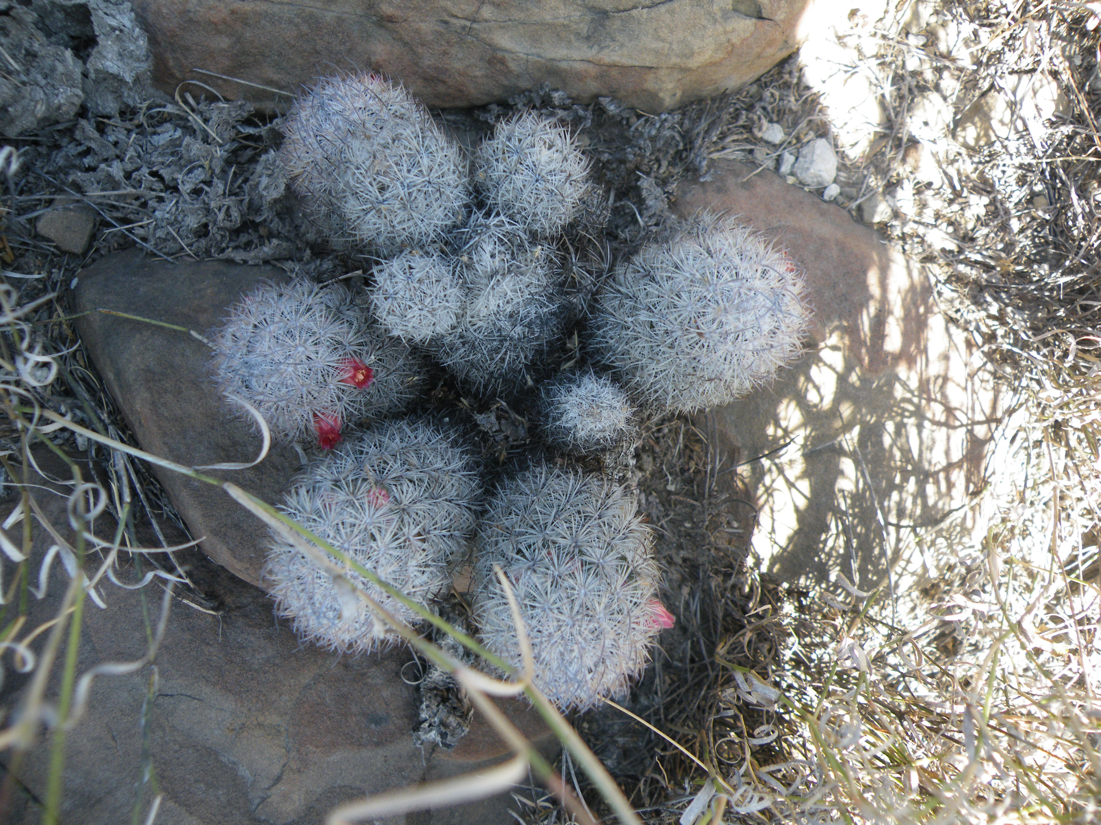 4 kms before La Gloria, Nuevo Leon